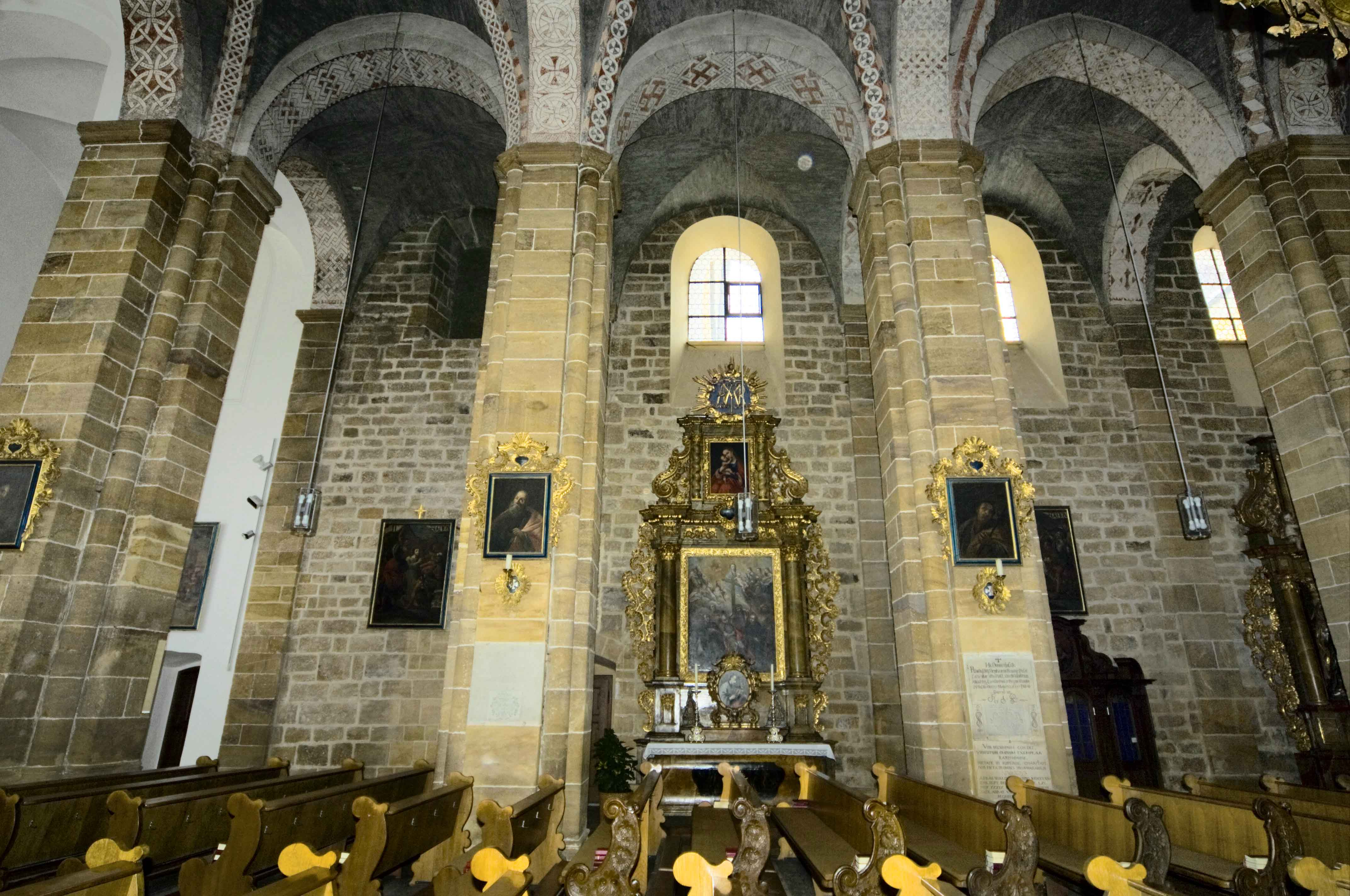 Kirchenansicht Kloster Nordinnenansicht